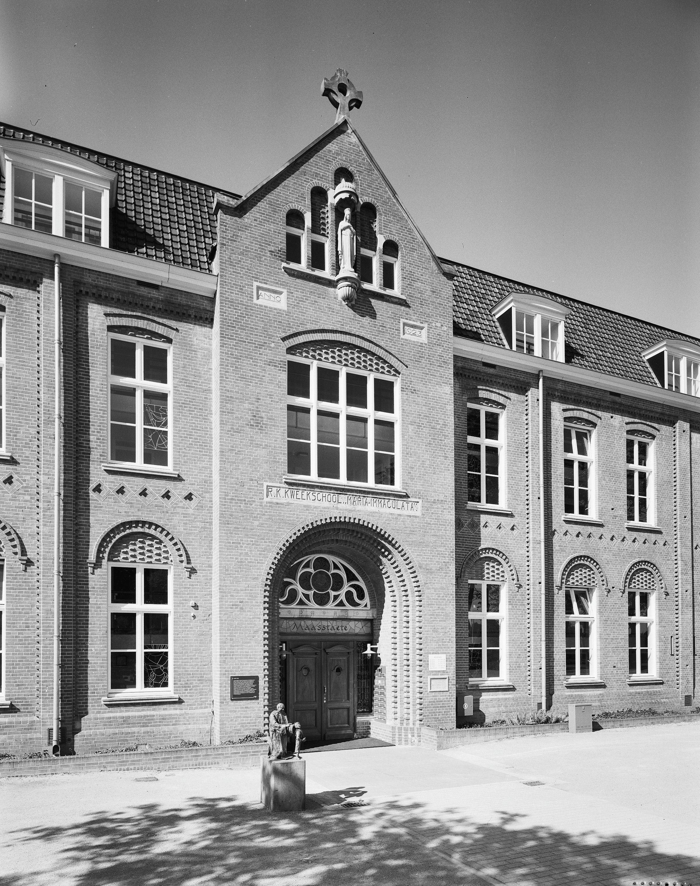 Rooms-Katholieke Kweekschool Maria Immaculata: Overzicht gedeelte voorgevel (opmerking: Gefotografeerd voor Monumenten In Nederland Limburg, bladzijde 267)